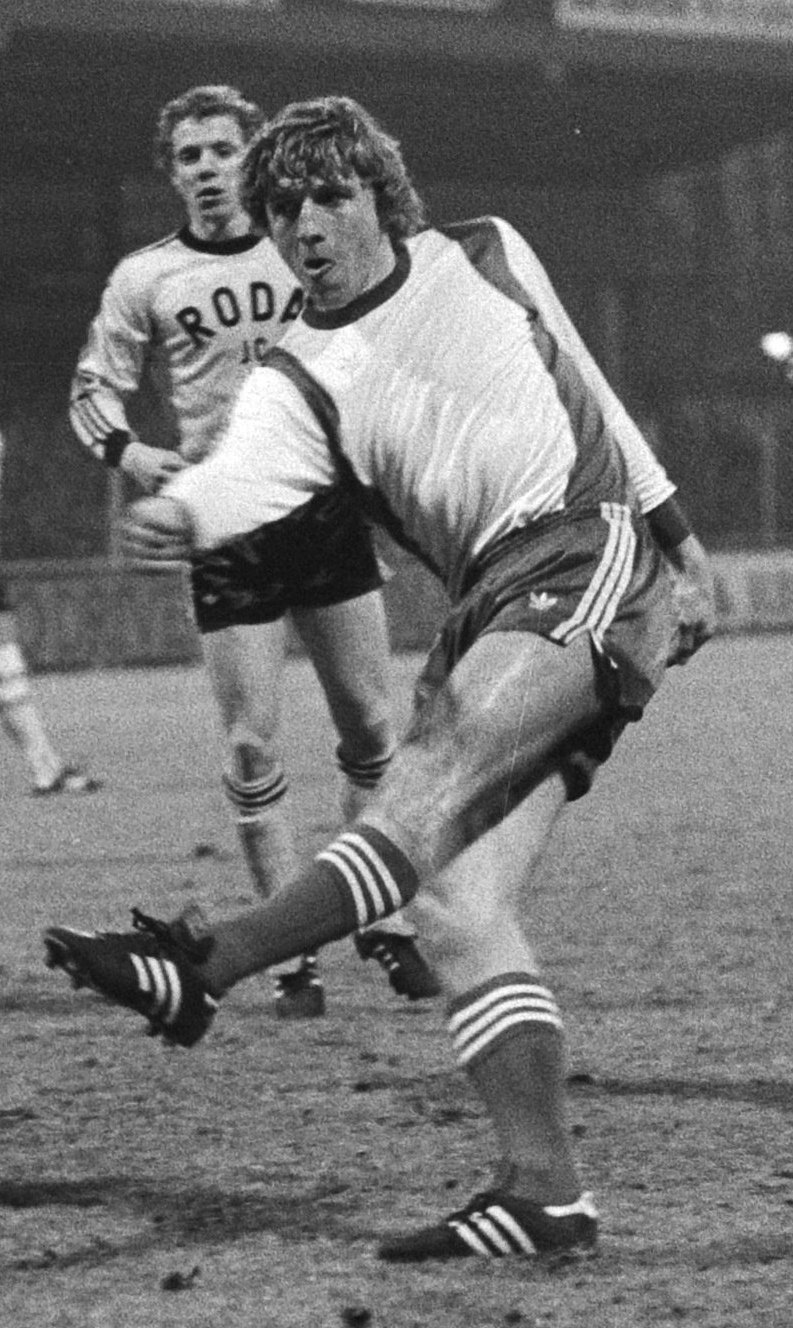 Collectie / Archief : Fotocollectie Anefo Reportage / Serie : AZ 67 tegen Roda JC 3-1 Beschrijving : Nygaard scoort het 1e doelpunt voor AZ, v.l.n.r. de Jong, Ziegler(Roda), Ressel (AZ), Degens (Roda), Nygaard (AZ) en Pfeiffer (Roda) Datum : 24 maart 1979 Locatie : Alkmaar, Noord-Holland Trefwoorden : sport, voetbal Persoonsnaam : Degens, Leo, Nygaard, Kristen, Pfeiffer, John, Ressel, Peter, Ziegler, Sten Fotograaf : Suyk, Koen / Anefo Auteursrechthebbende : Nationaal Archief Materiaalsoort : Negatief (zwart/wit) Nummer archiefinventaris : bekijk toegang 2.24.01.05 Bestanddeelnummer : 930-1853